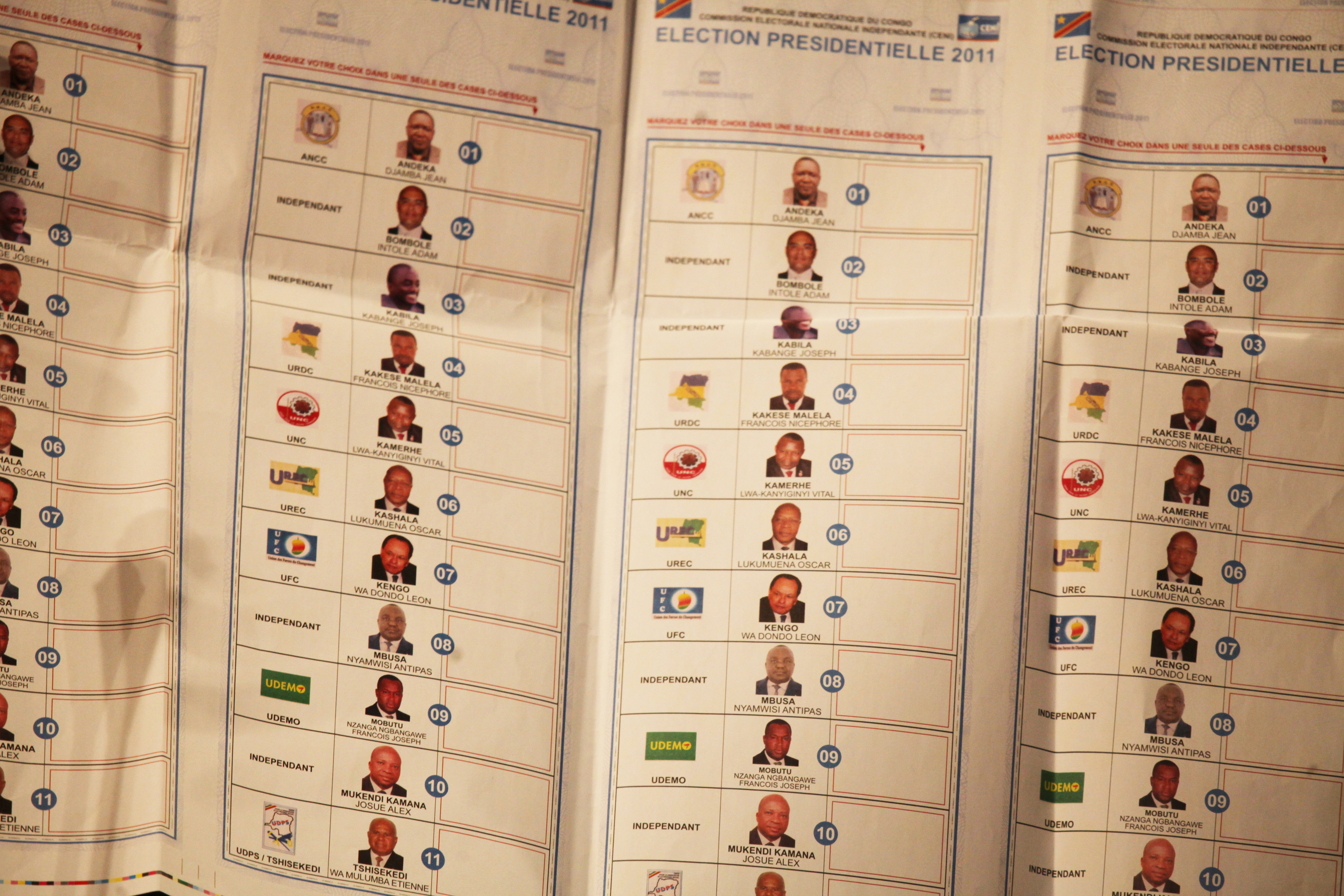 2011_11_01_Palais du peuple Etat des lieux du processus électoral en RDC sur la campagne en cours © MONUSCO/Myriam Asmani Le président de la CENI a réunis tout les partis politiques pour faire le point sur la campagne électoral en cours.